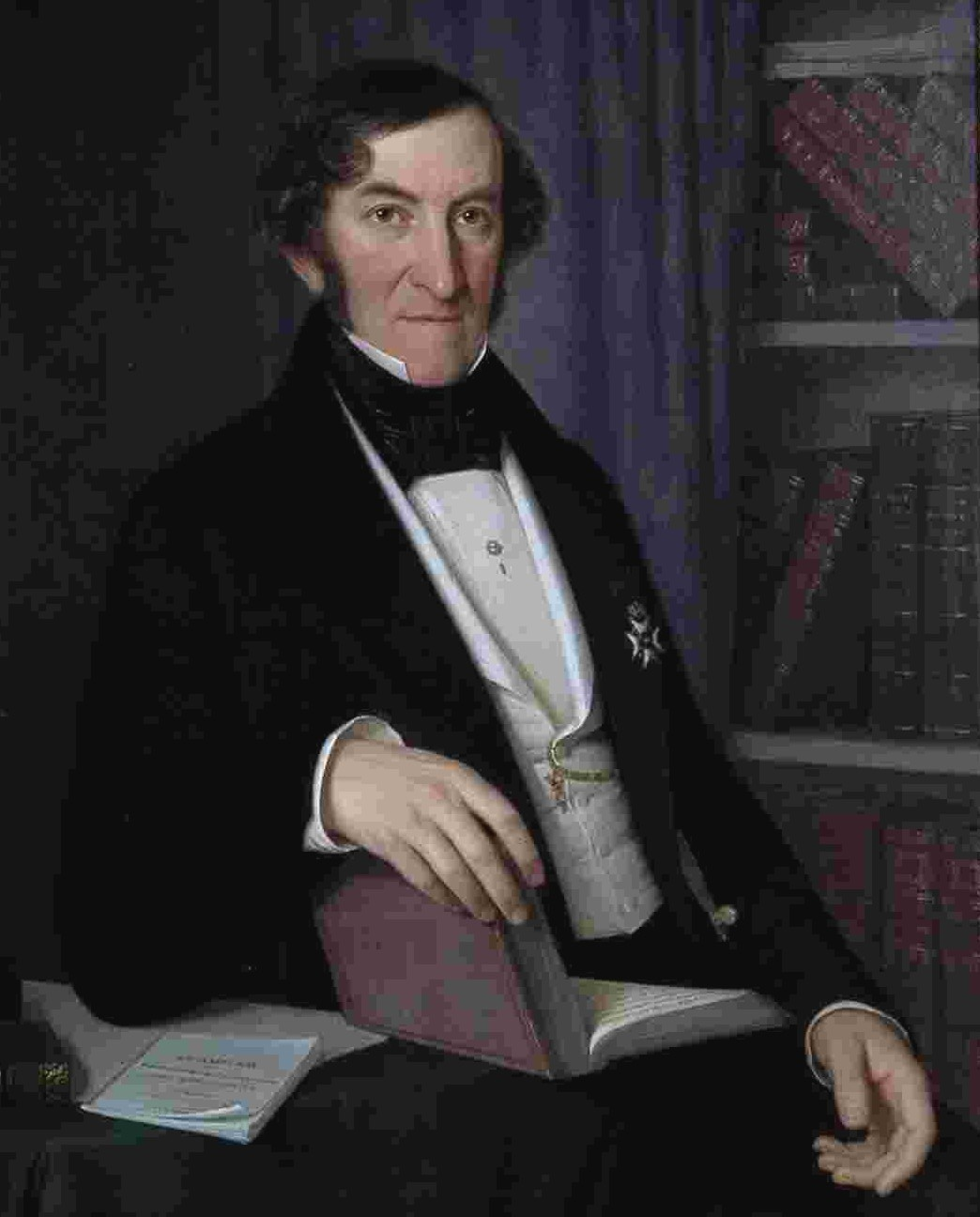 Oljemålning på Professor och Directeur Carl Palmstedt, Chalmers Tekniska Högskola.